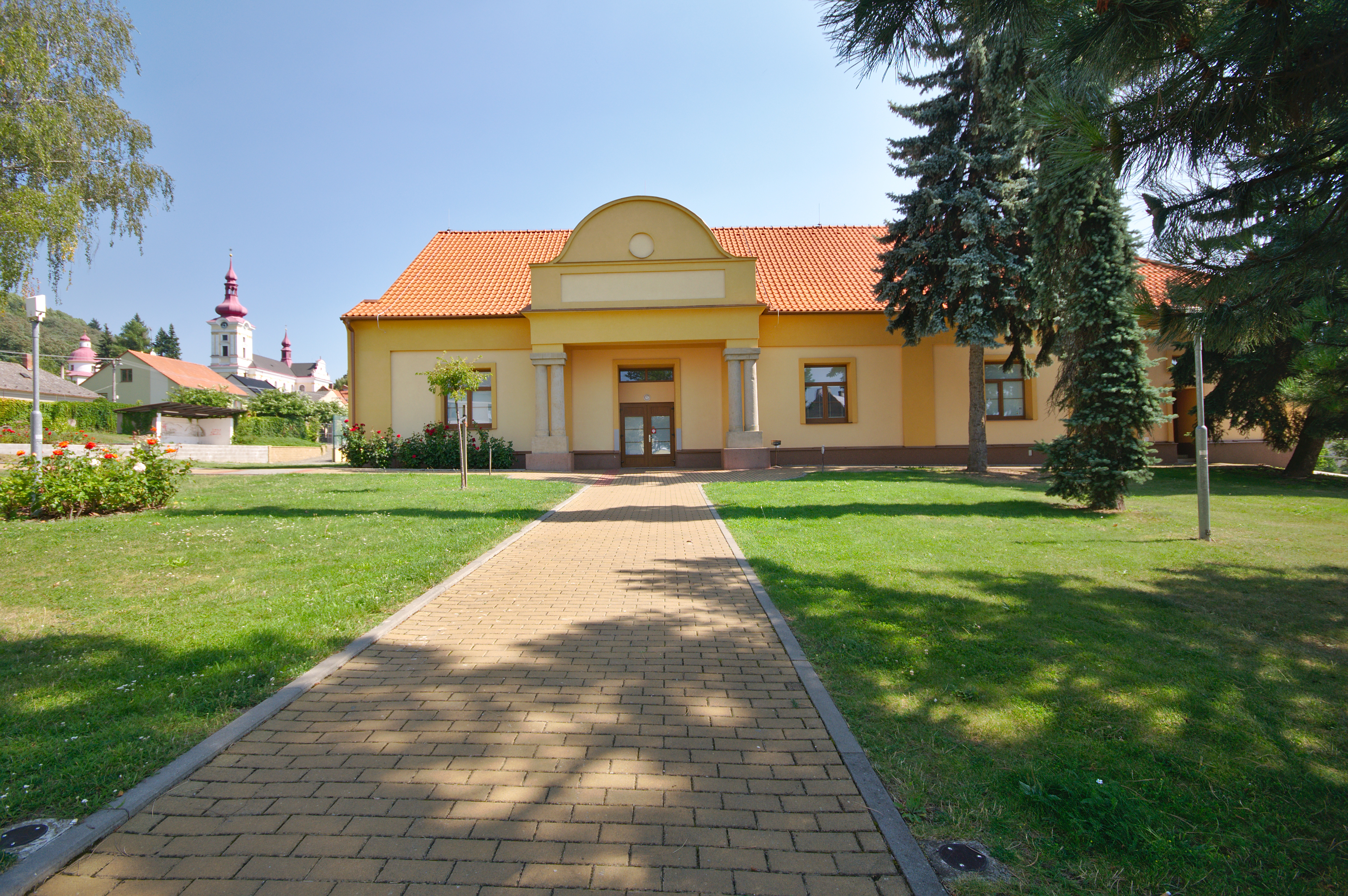 Základní škola, Pustiměř, okres Vyškov